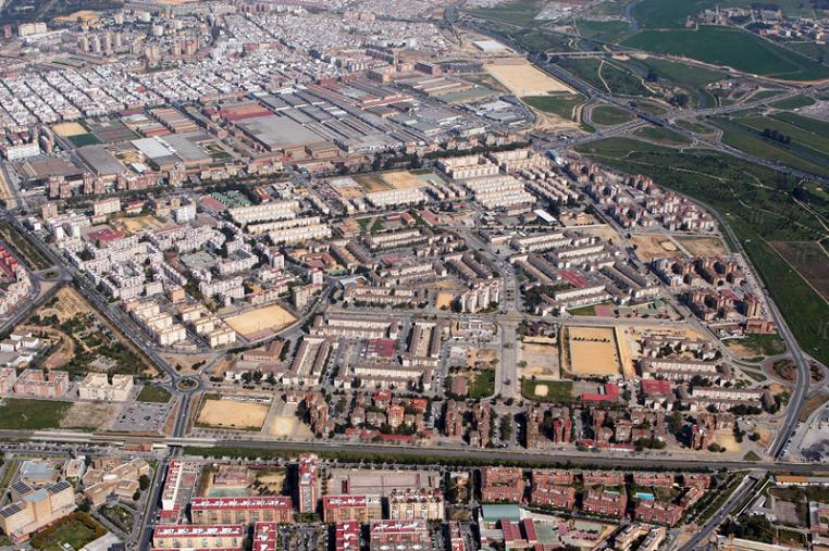 Vista Area Poligono Sur 2009